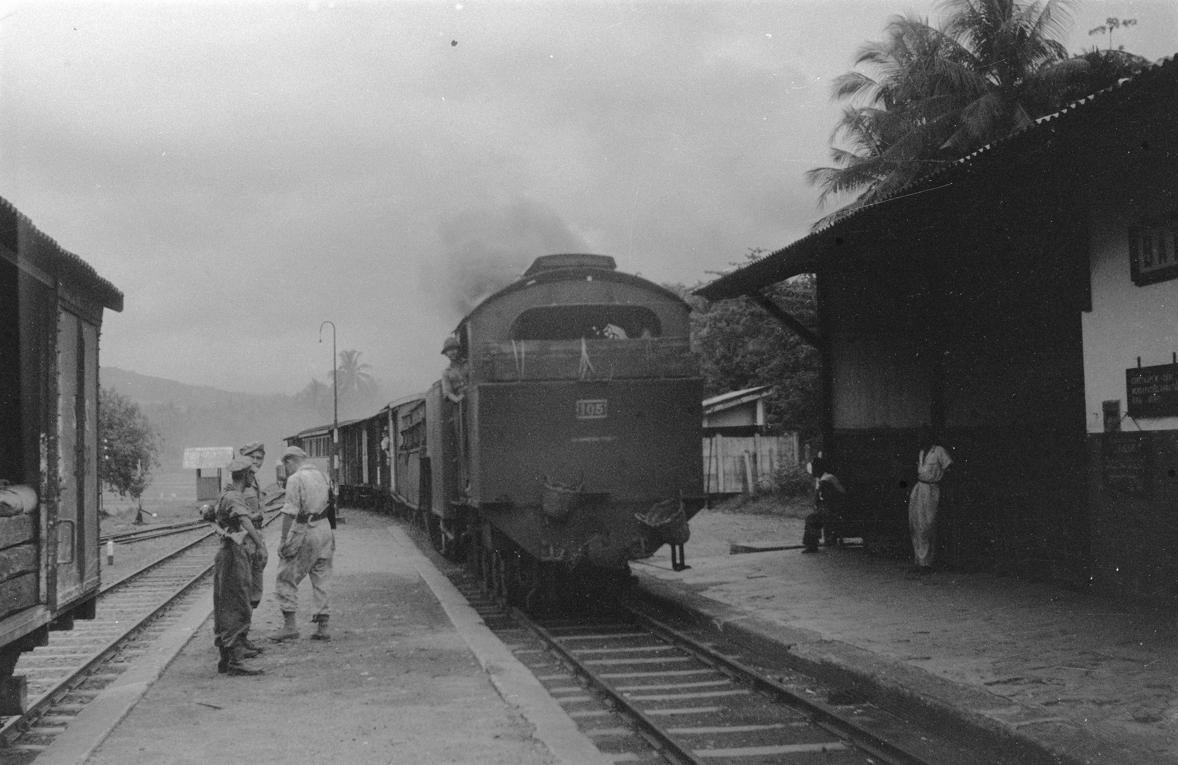 Collectie / Archief : Fotocollectie Dienst voor Legercontacten Indonesië Reportage / Serie : [DLC] Van Singkarak naar Padang Pandjang Beschrijving : [trein komt een station binnengereden] Datum : januari 1949 Locatie : Indonesië, Nederlands-Indië, Sumatra Fotograaf : Burgt, Th. van de / DLC Auteursrechthebbende : Nationaal Archief Materiaalsoort : Negatief (zwart/wit) Nummer archiefinventaris : bekijk toegang 2.24.04.02 Bestanddeelnummer : 3190